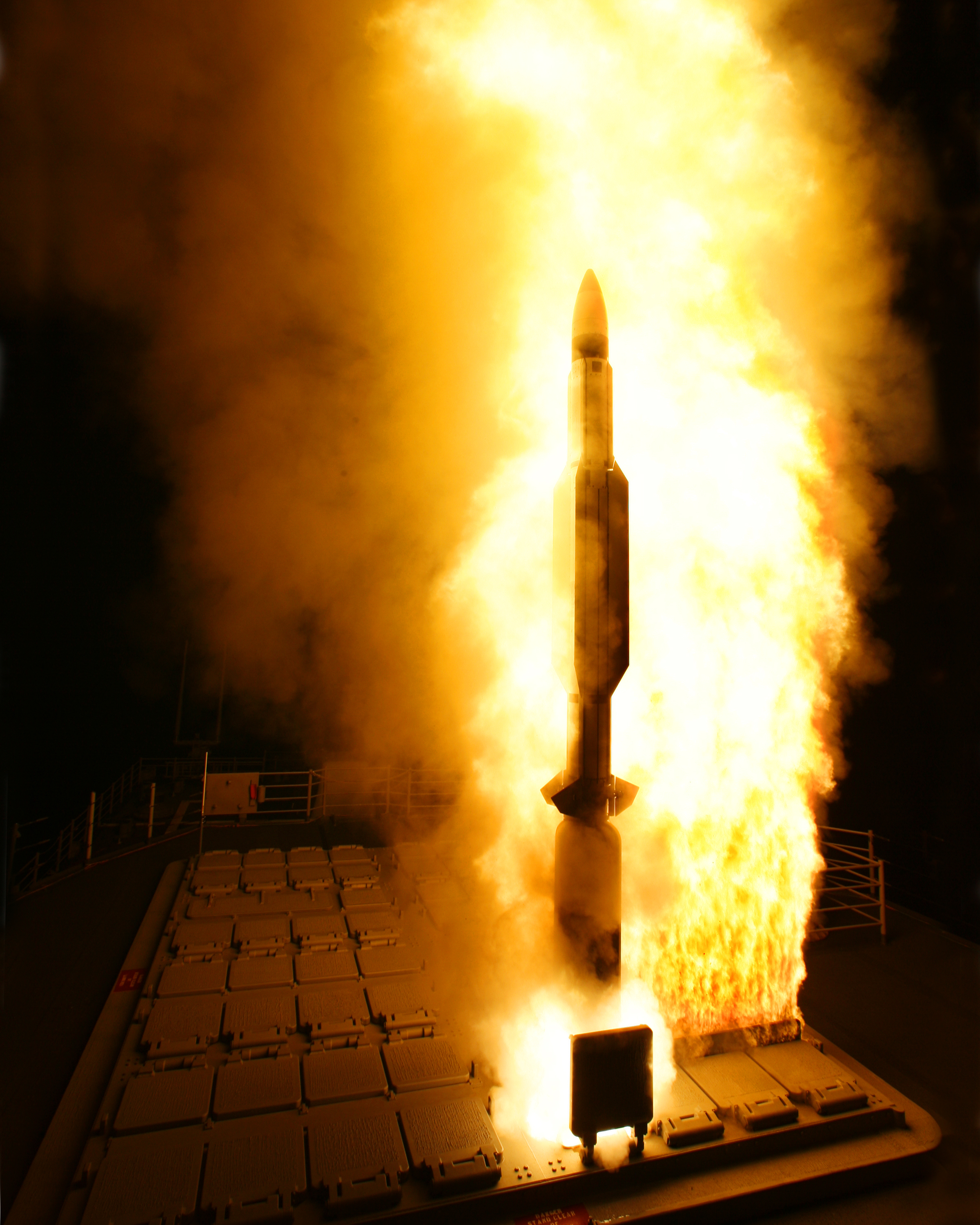 SM-3 launch